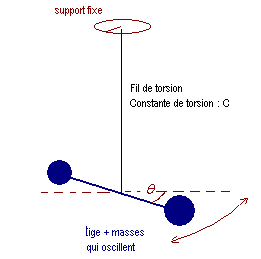 Pendule de torsion (Schéma personnel) Catégorie: schéma_de_physique